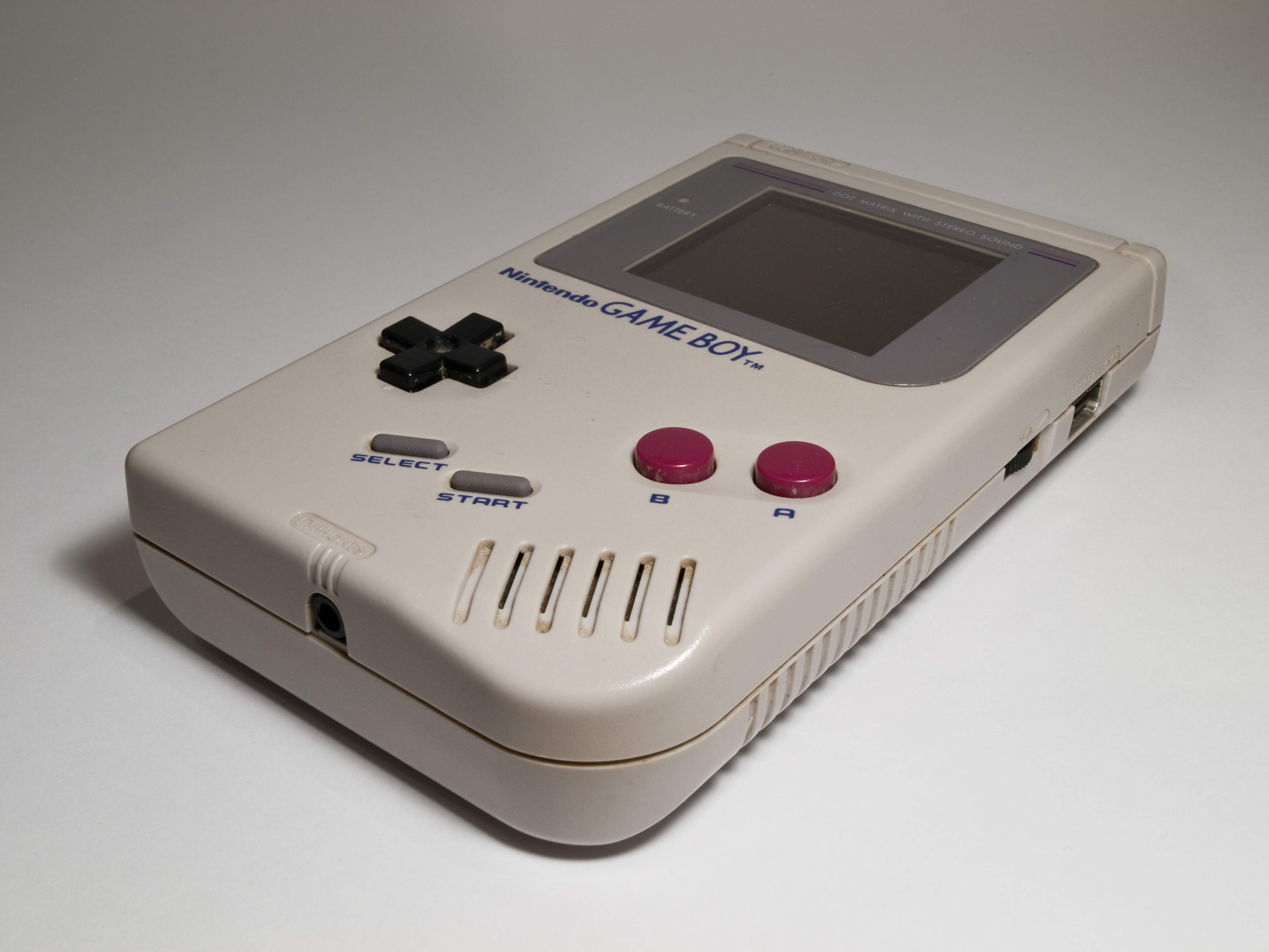 Original Nintendo Game Boy